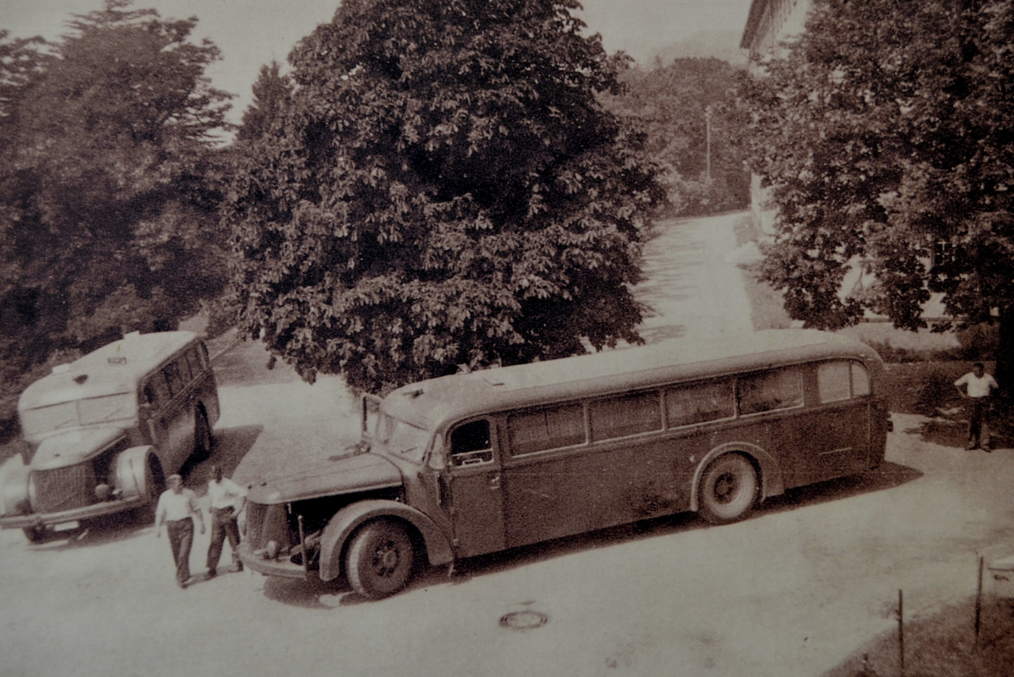 De grijze bussen van ’Gemeinnützige Krankentransportgesellschaft mbH waarin de patiënten werden vervoerd (foto publicatiebord)